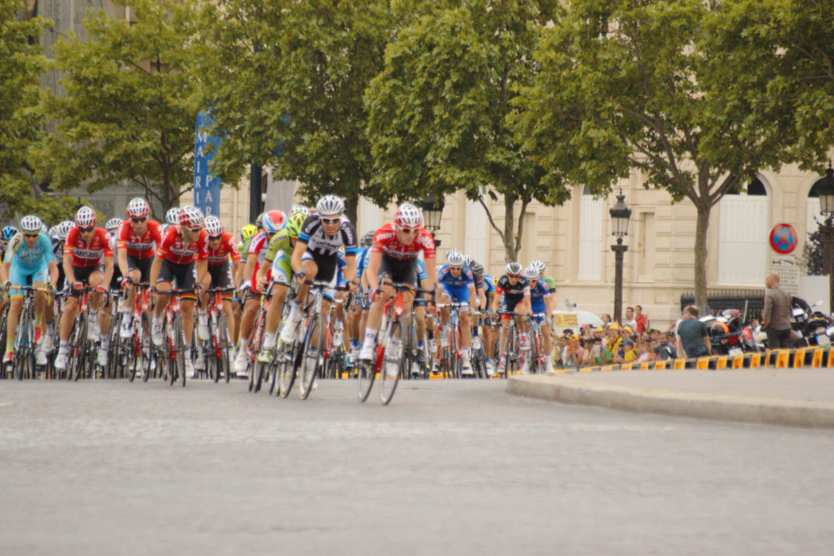 21è étape du Tour de France 2014, Evry-Paris Champs Elysées, photo prise à Paris au pied de l'Arc de Triomphe.